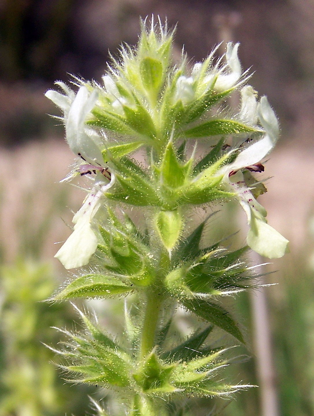 Stachys ocymastrum - Inflorescencia: detalle - La Huerta, Albatera (Provincia de Alicante, España)